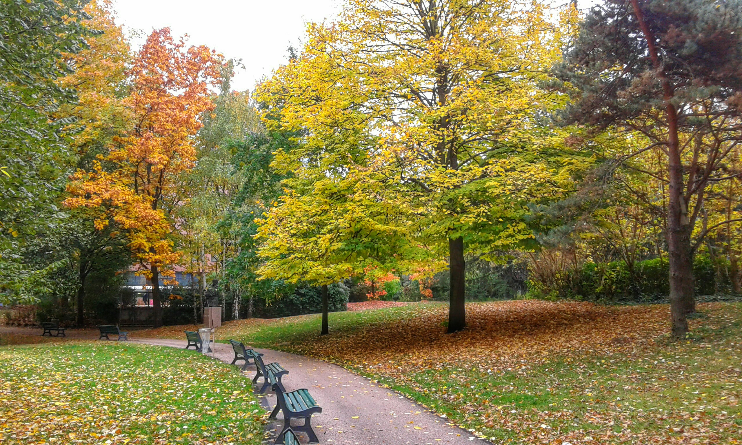 Parque de Compans Cafarelli en Otoño